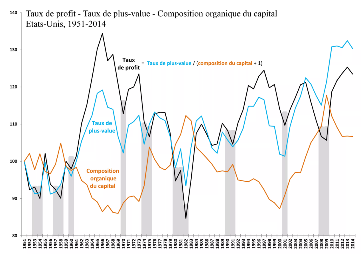 Baisse tendancielle du taux de profit au Etats-Unis avec composition du capital comparée